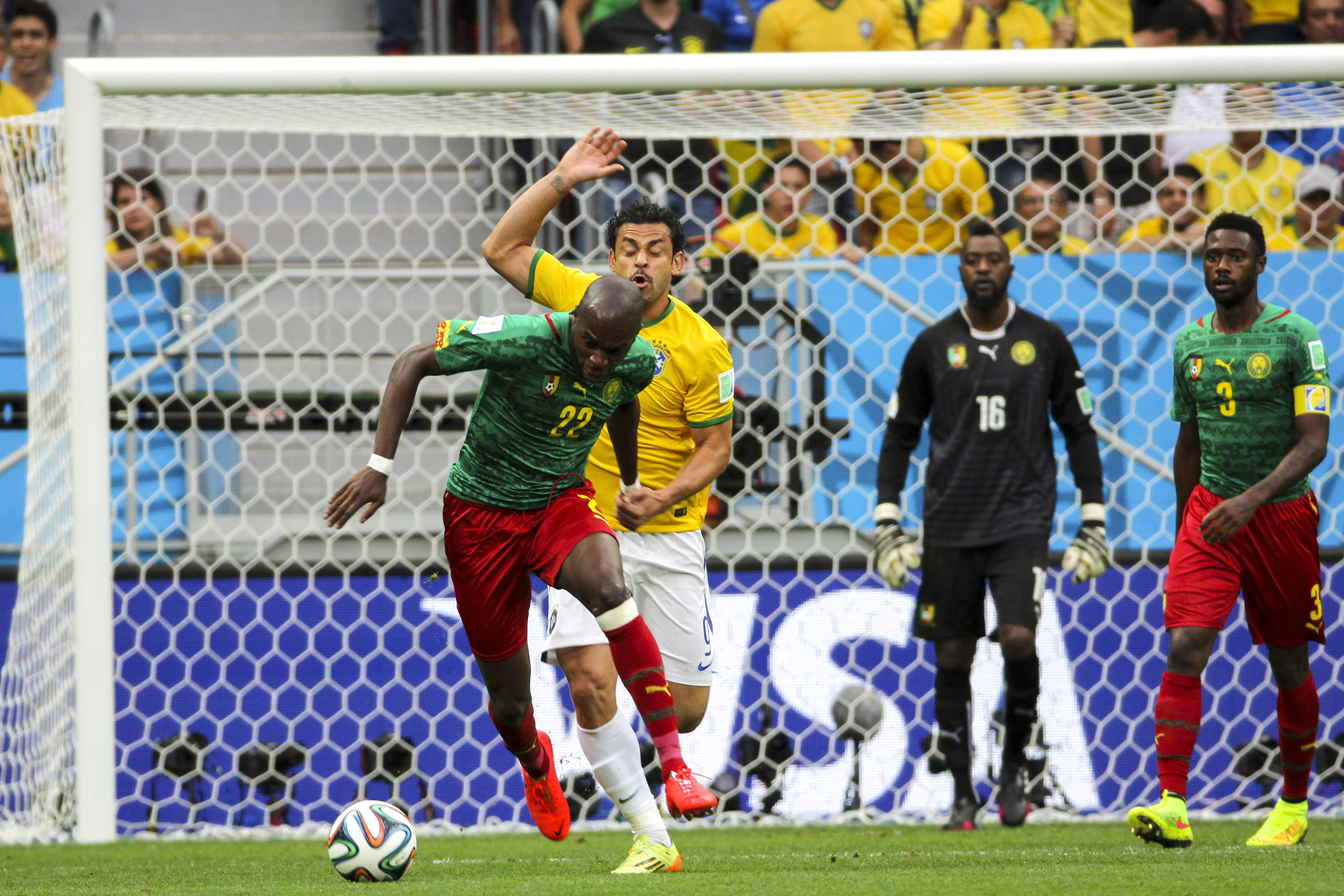 Brasil x Camarões, no Estádio Nacional Mané Garrincha em Brasília.